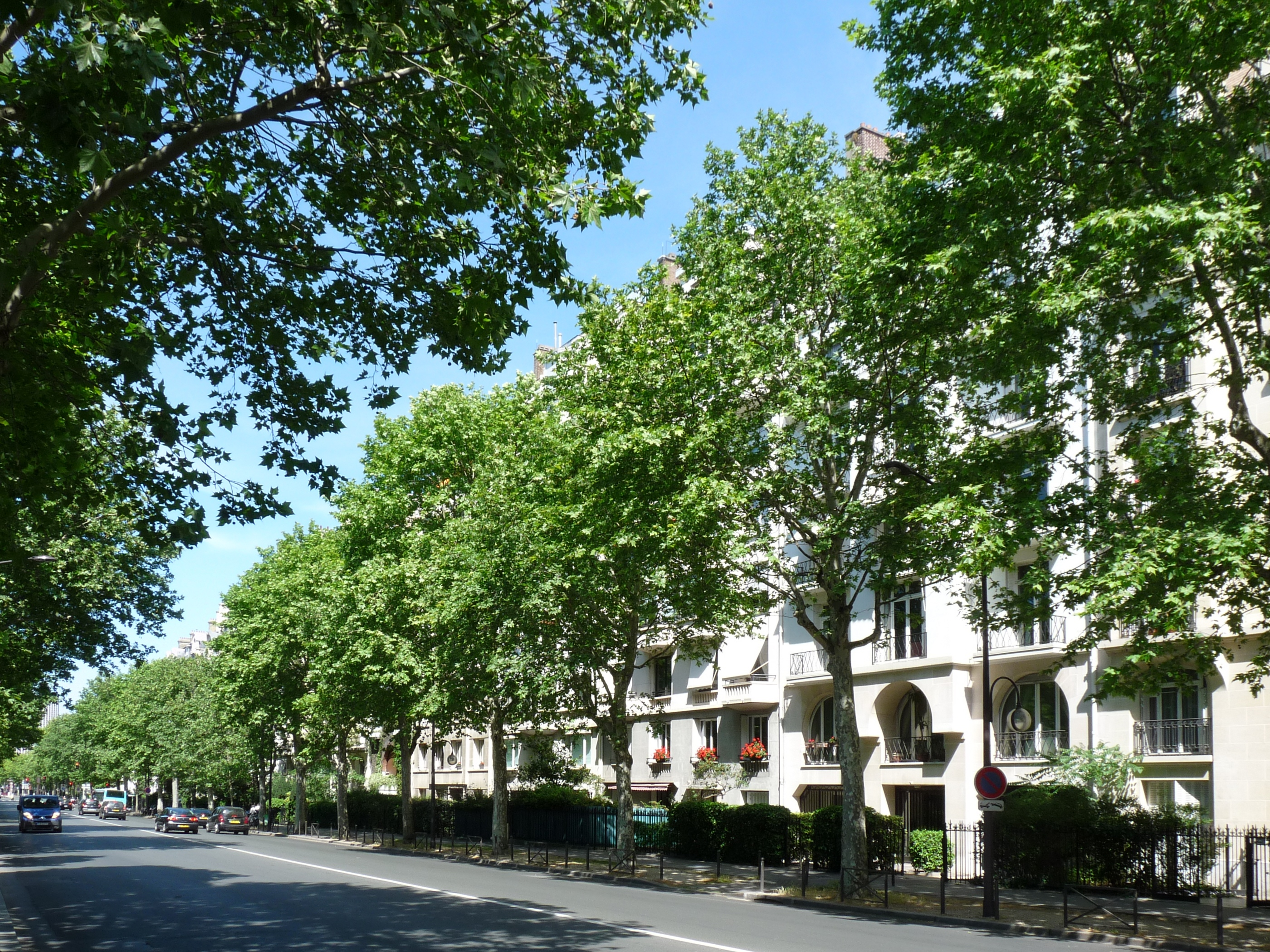 Le Boulevard Lannes à Paris, vue en direction du nord.